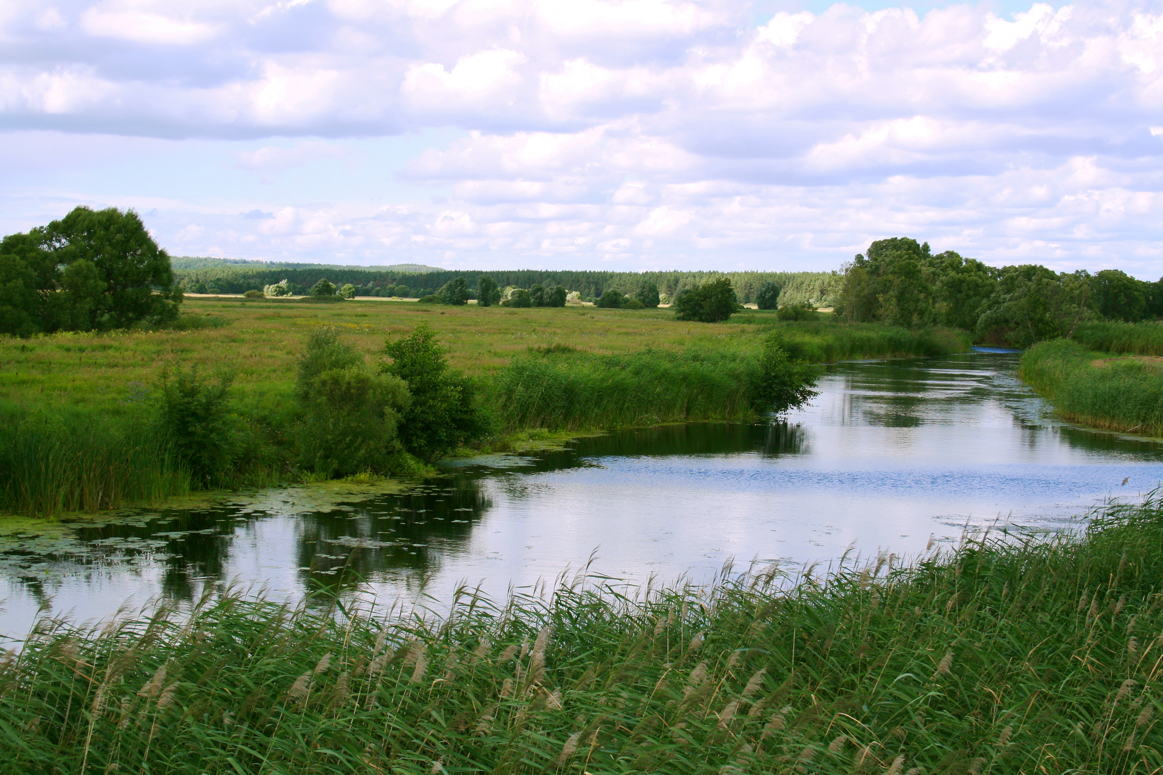 Река Псёл у села Самарино. Ивнянский район Белгородской области.